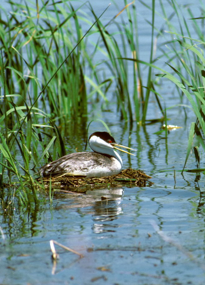 Western grebe on nest